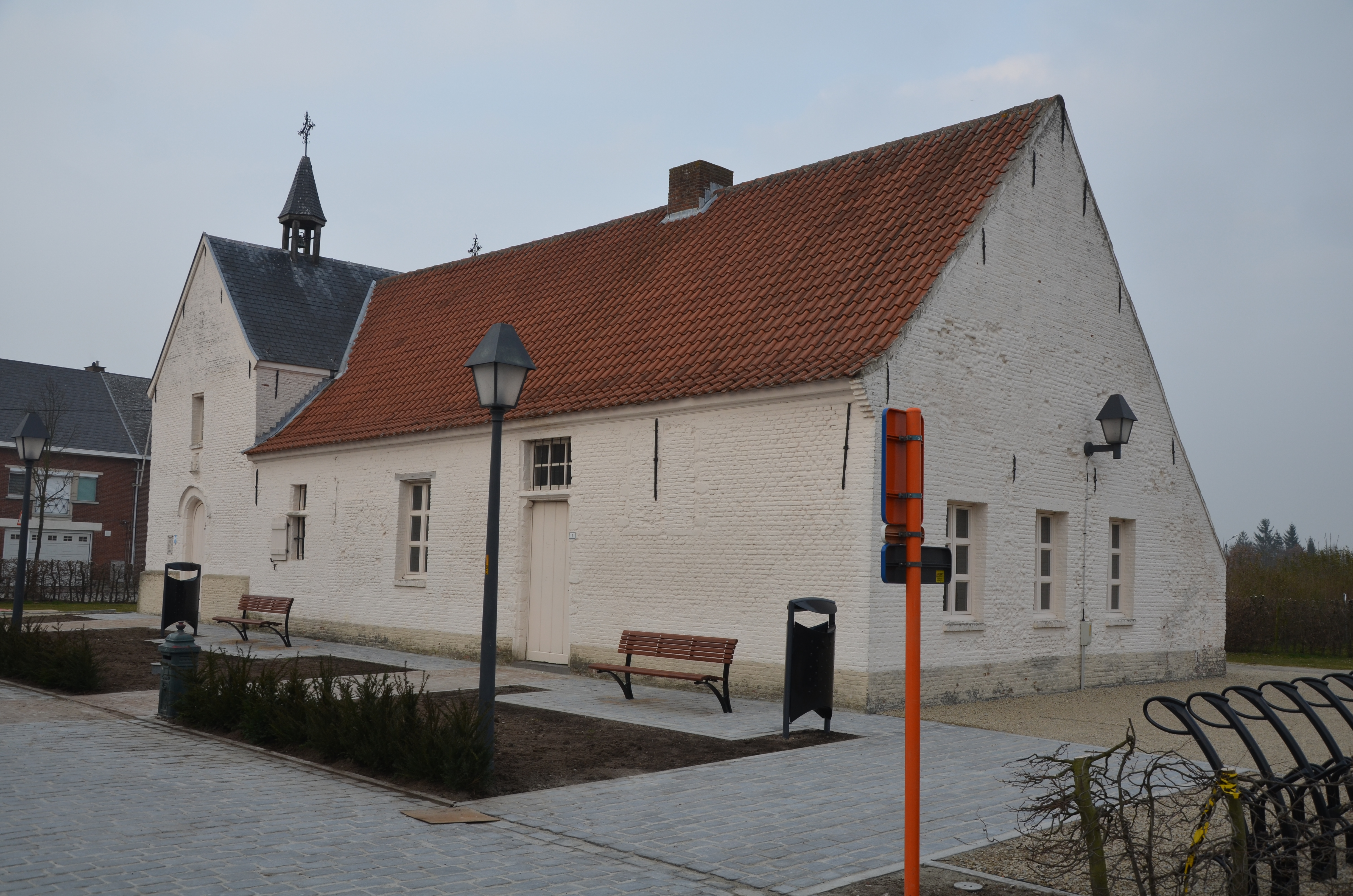 Casa a costat de la Capella de Llàtzer